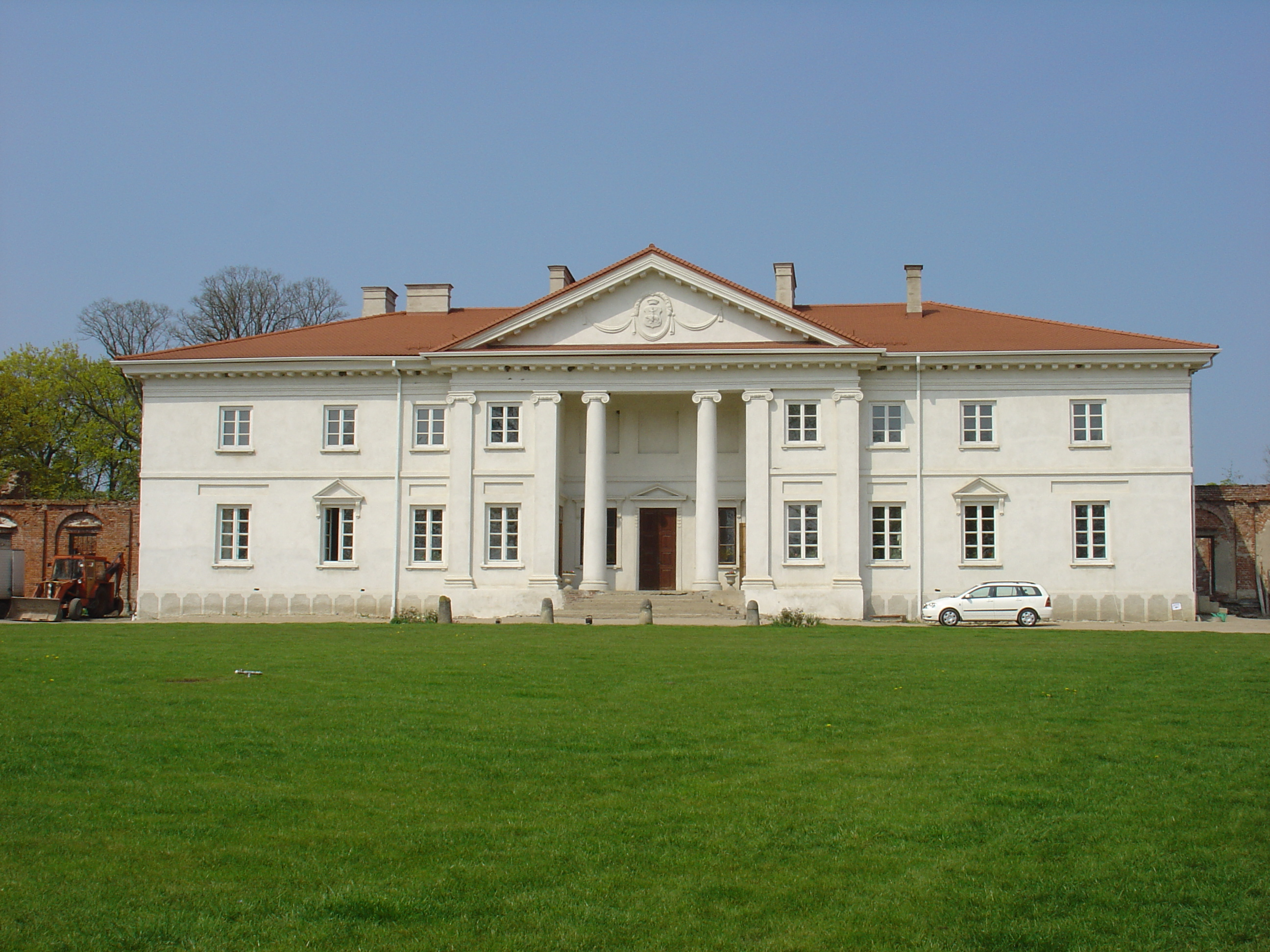 Pałac w Korczewie